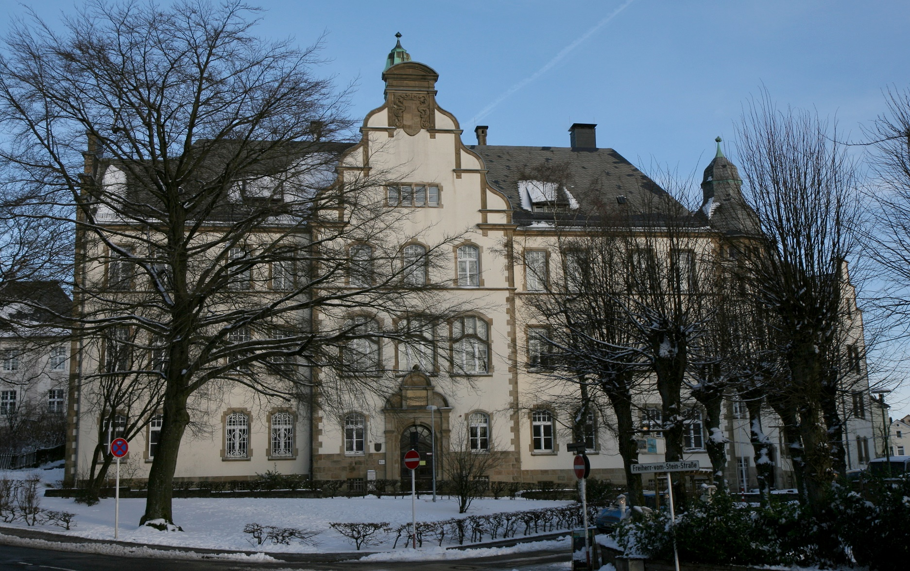 Ehemaliges Gebäude des Amtsgerichts Lüdenscheid, Philippstraße 29.